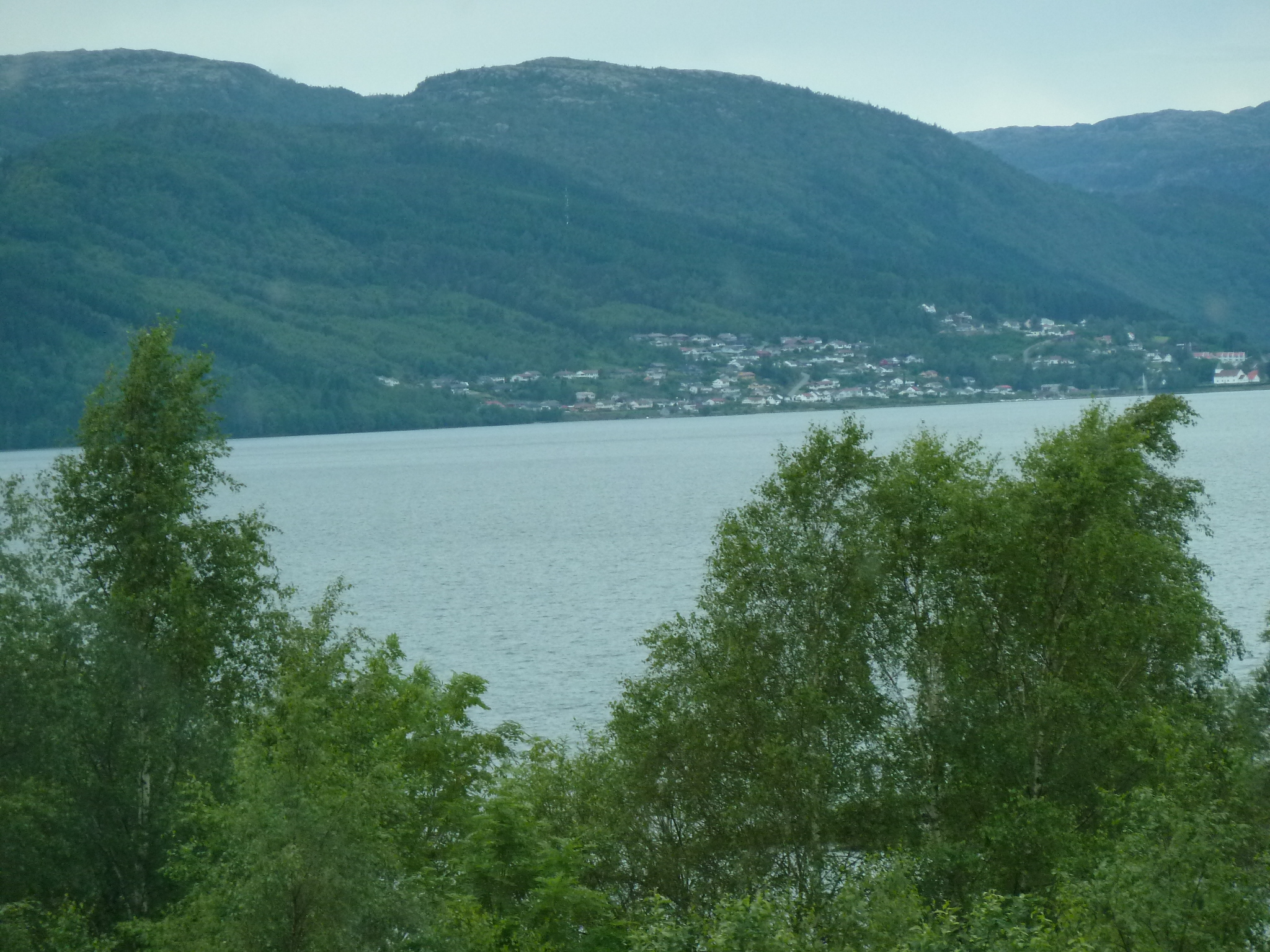 Leidingshaugen/Lundestranda am Lundesee